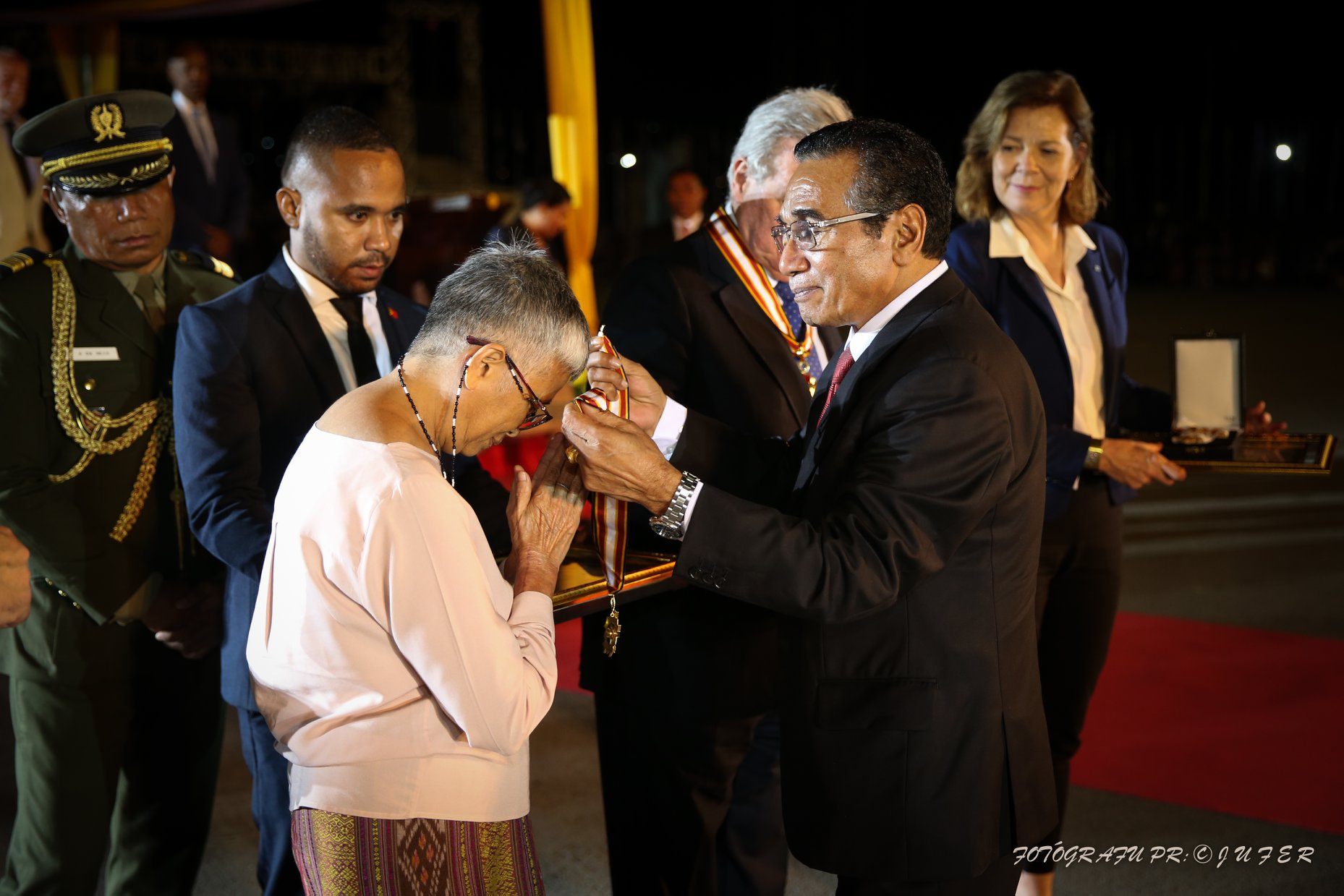 Chalida Tajaroensuk bekommt den Ordem de Timor-Leste von Francisco Guterres bei den Feierlichkeiten zum zwanzigsten Jubiläum des Unabhängigkeitsreferendums.